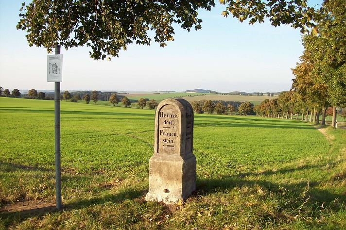 Königlich-sächsischer Abzweigstein bei Reichenau